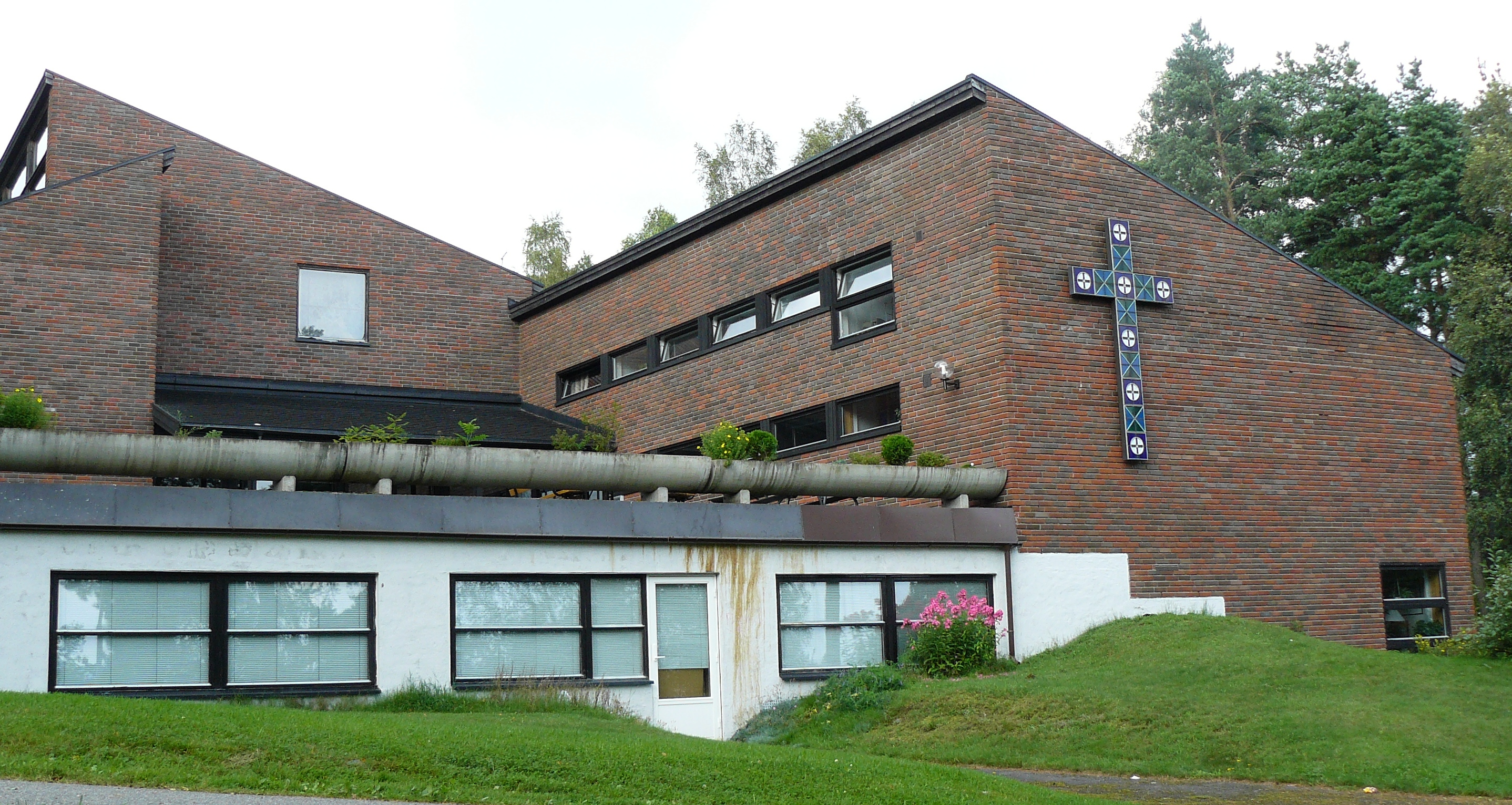 Rødtvet church, Oslo